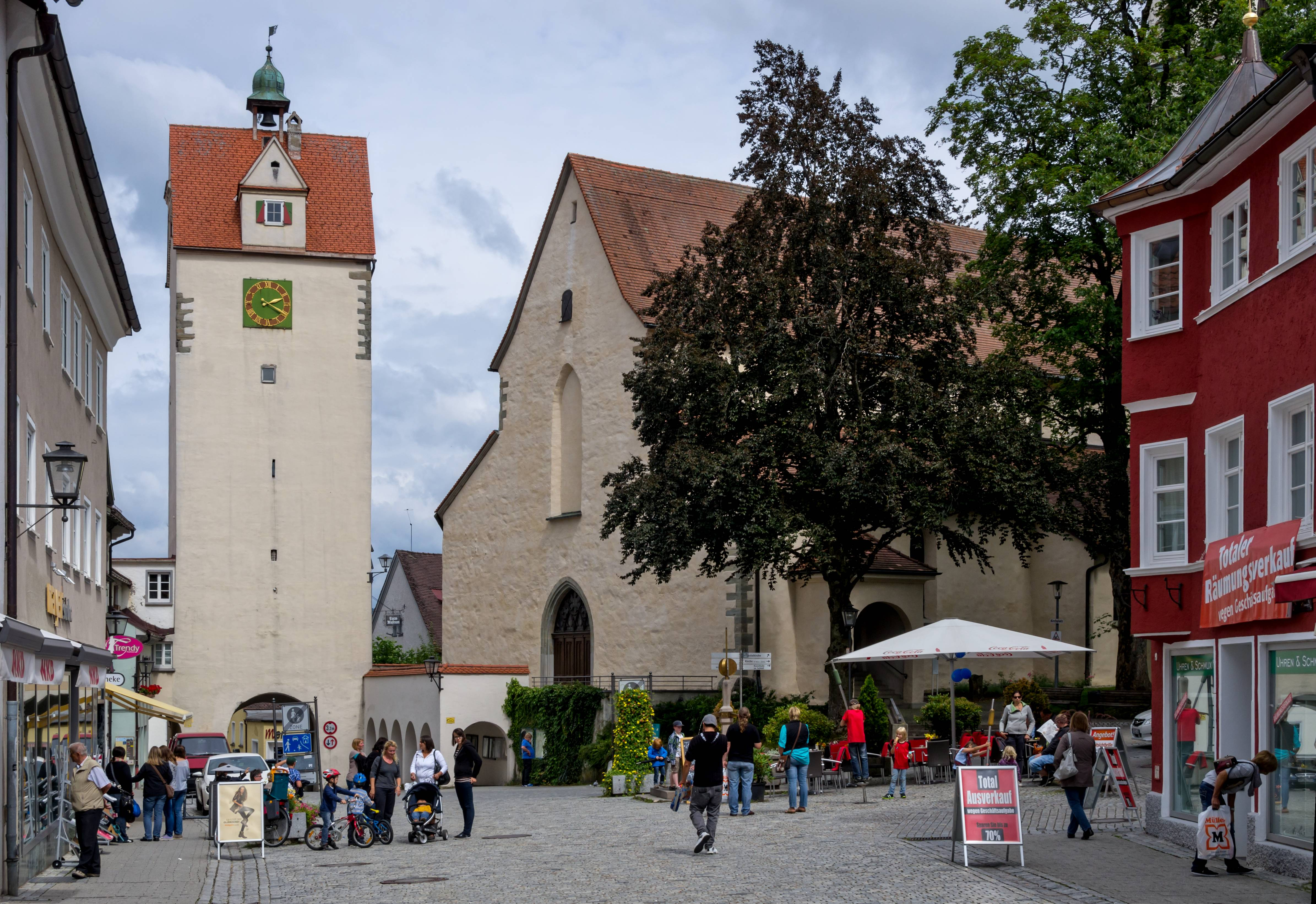 Bilder aus Isny im Allgäu